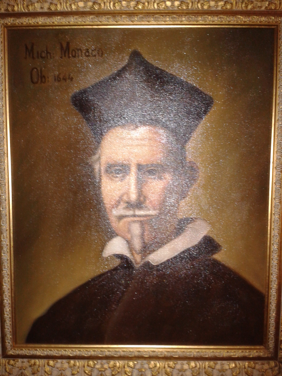 Palazzo Episcopale